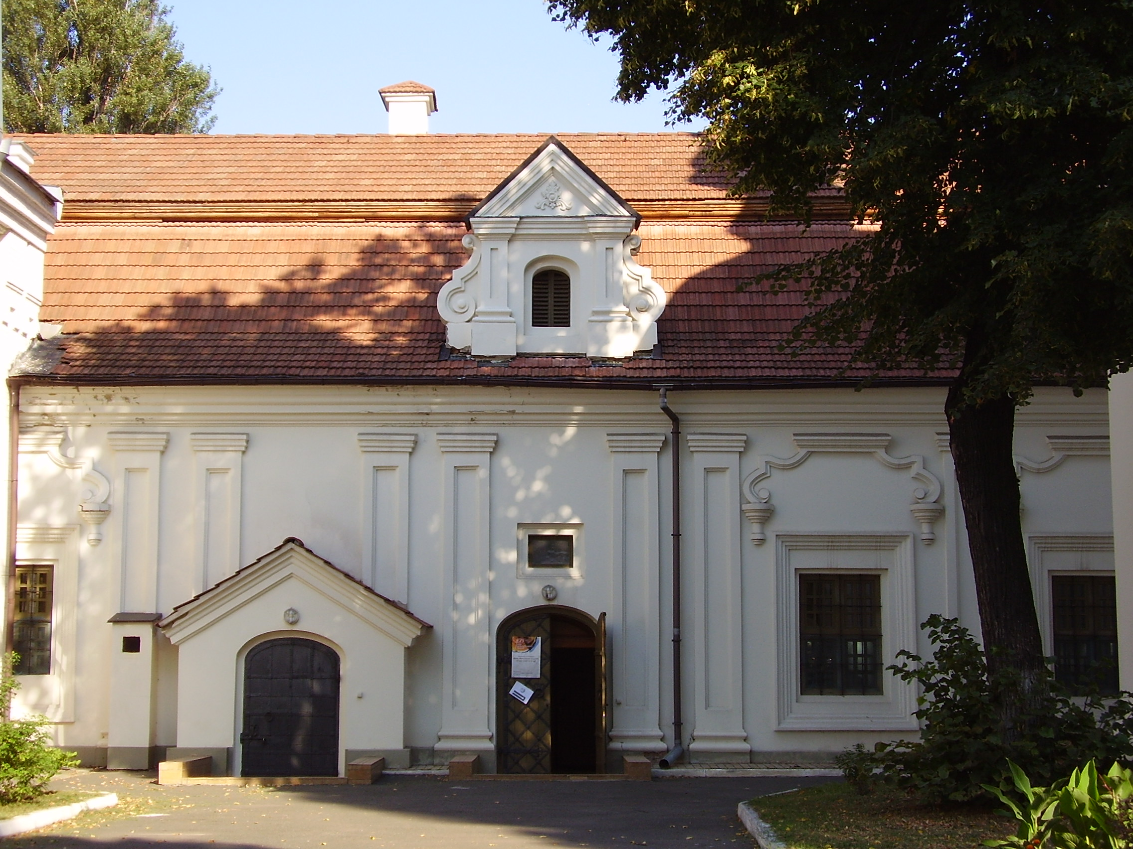 Поварня з келіями, Київ, Сковороди Григорія вул., 2-а